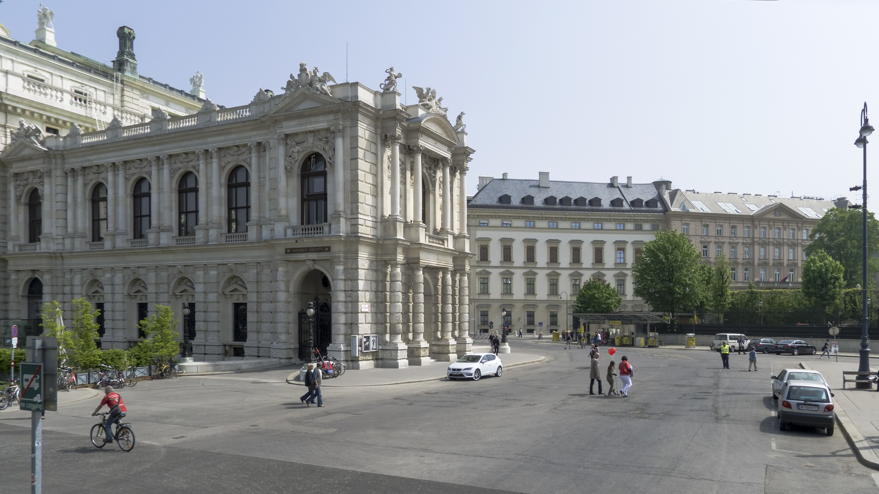 Josef-Meinrad-Platz in Wien 1 beim Burgtheater Richtung Nordosten